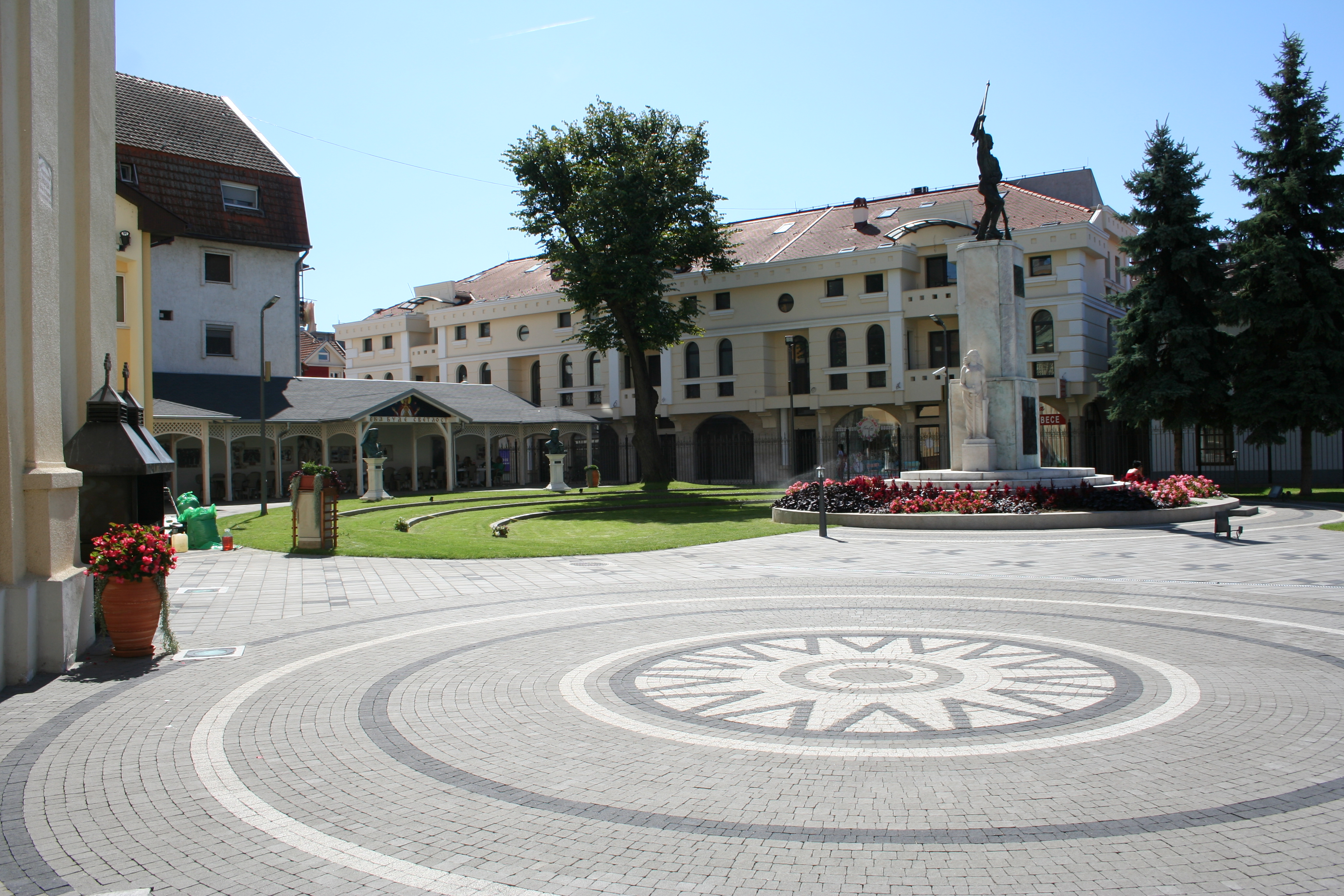 Šabac, porta Saborne crkve